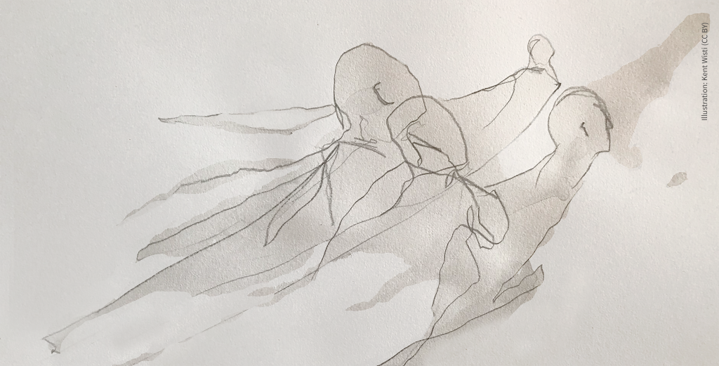 Illustration gjord av Kent Wisti inför Riksantikvarieämbetets höstmöte 2018. Temat för mötet är Kulturarv i en föränderlig värld – när rörelse är det konstanta.